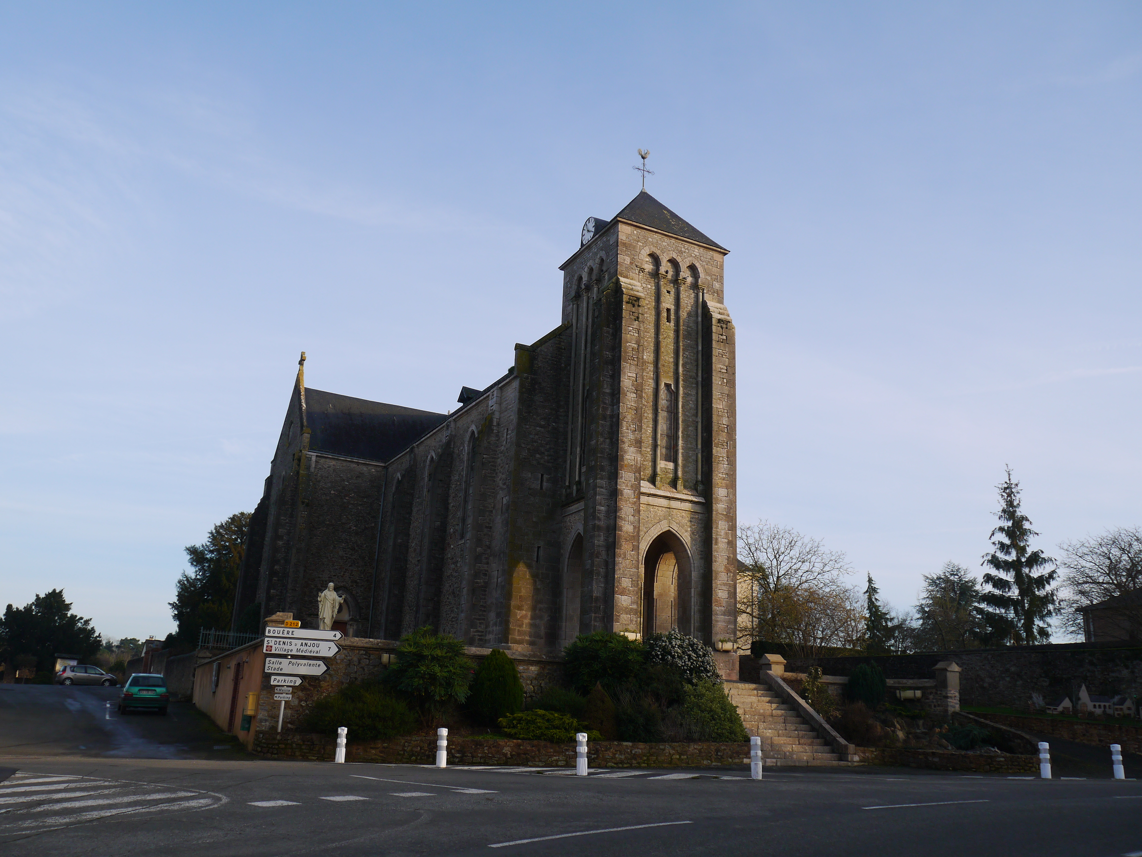 L'église Saint-Brice.